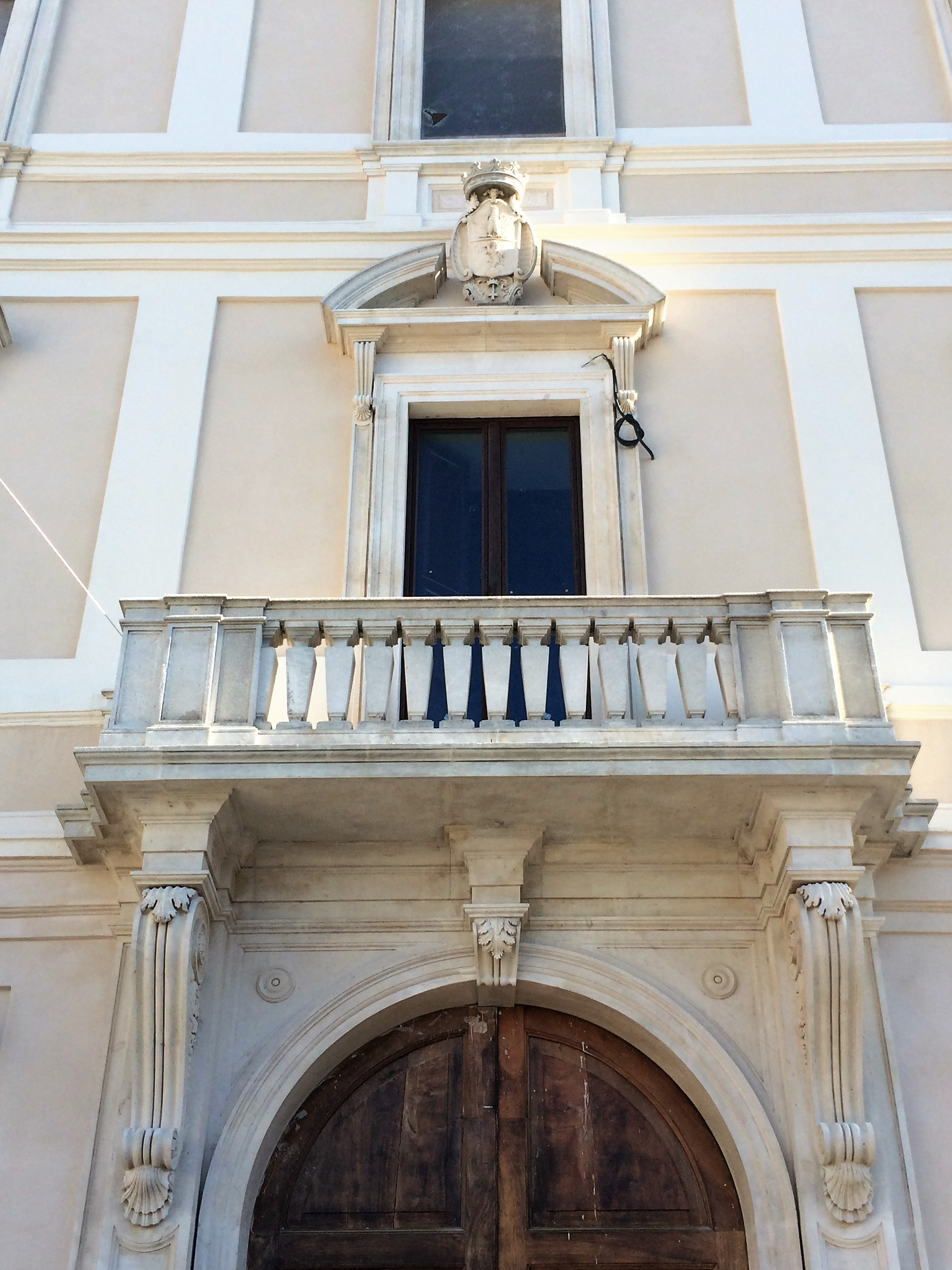 Particolare della balconata di Palazzo Betti in L'Aquila.